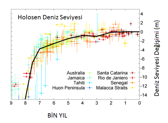 Holosen Döneminde Deniz Seviyesi Değişmleri